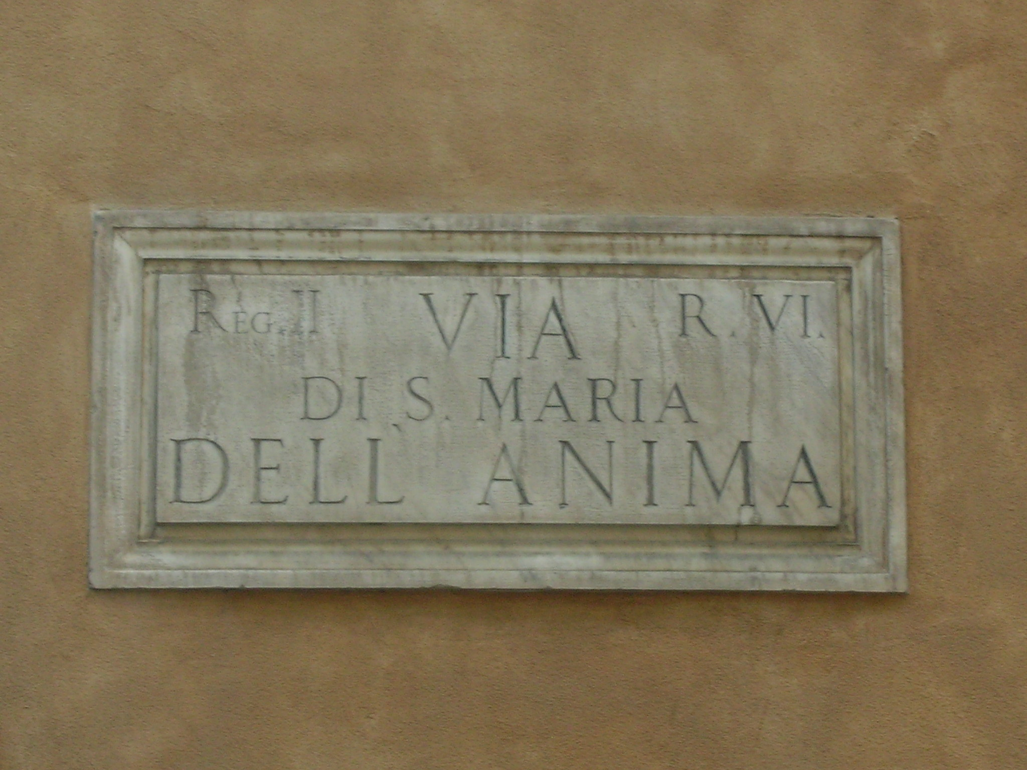 Targa viaria di "Via di Santa Maria dell'Anima", Roma